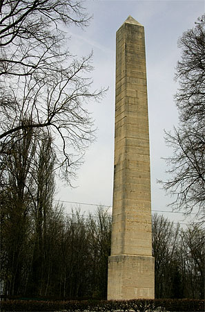 Murten: Schlachtdenkmal